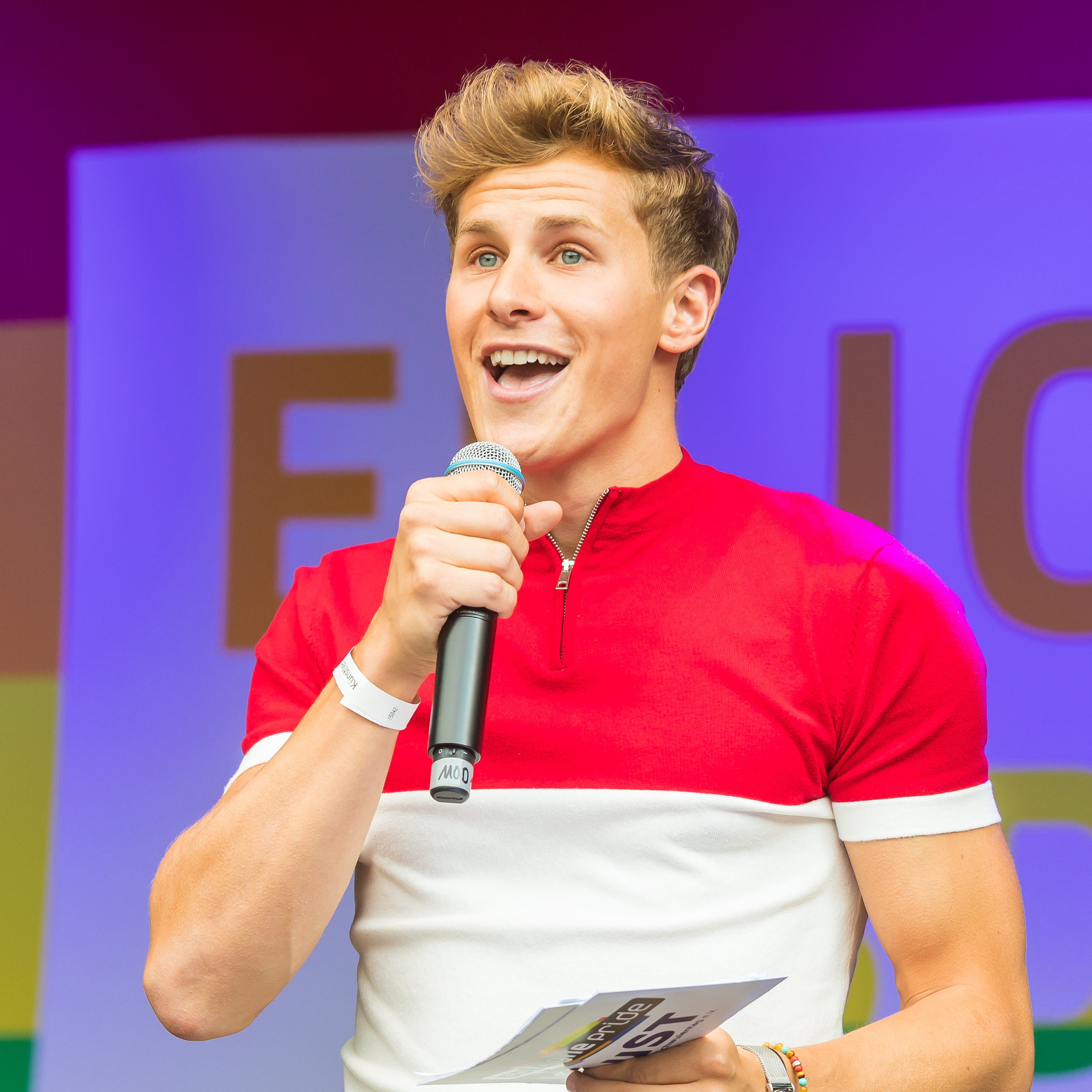 ColognePride/CSD 2018 - Moderation von Lukas Sauer auf der Hauptbühne, Heumarkt